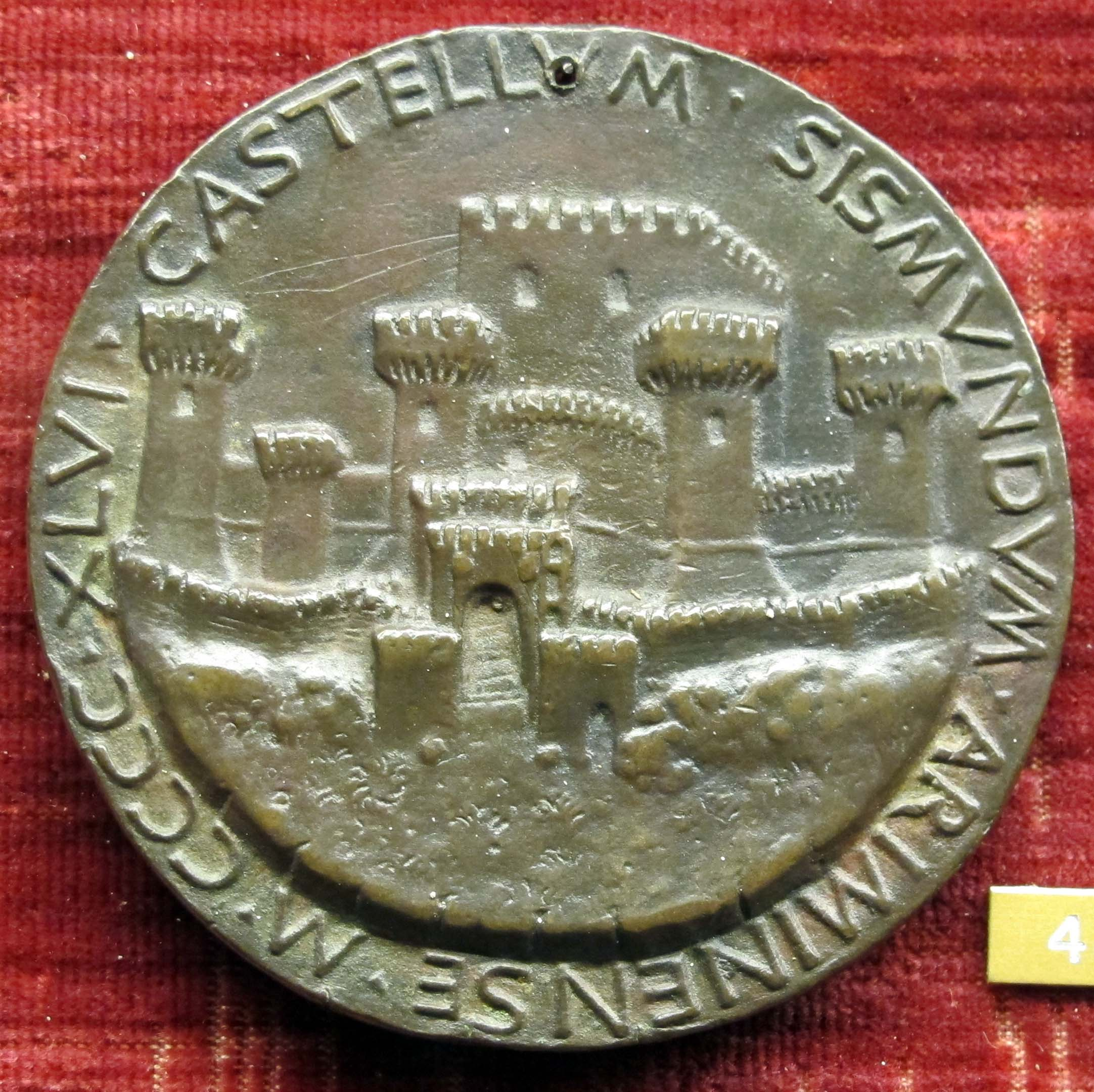 Matteo de' pasti, medaglia di sigismondo pandolfo malatesta con castel sismondo, verso, versione coi punti triangolari 1446